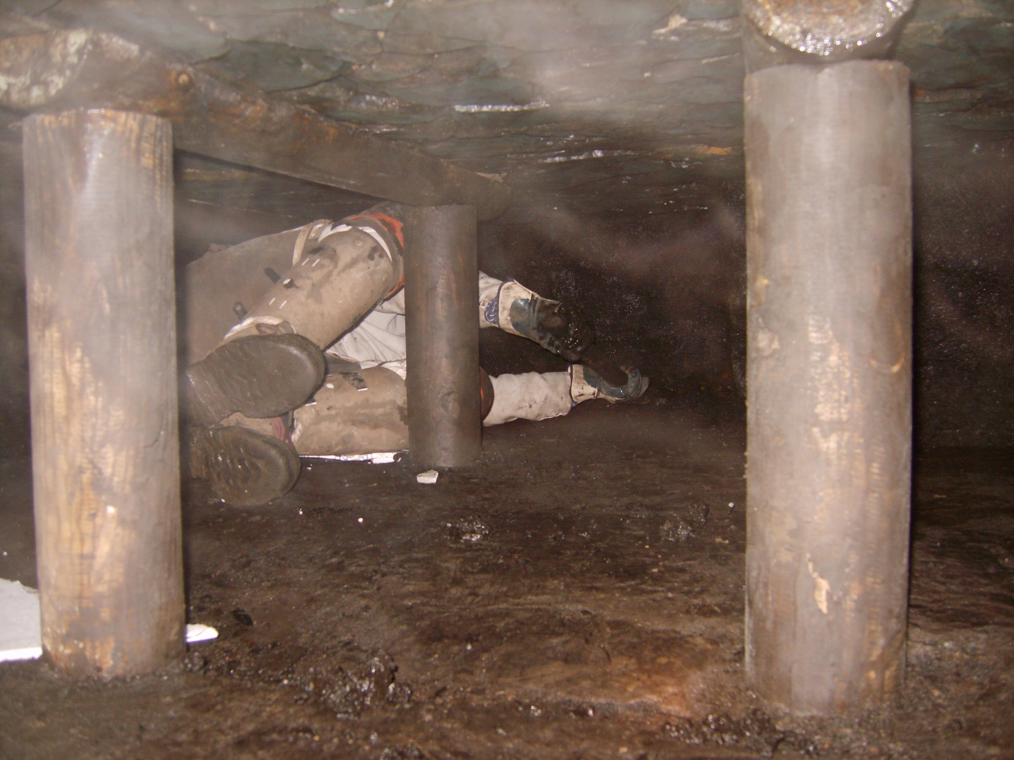 Abbau im Flöz (Bis auf die Styroporunterlage fast wie im 19. Jahrhundert)